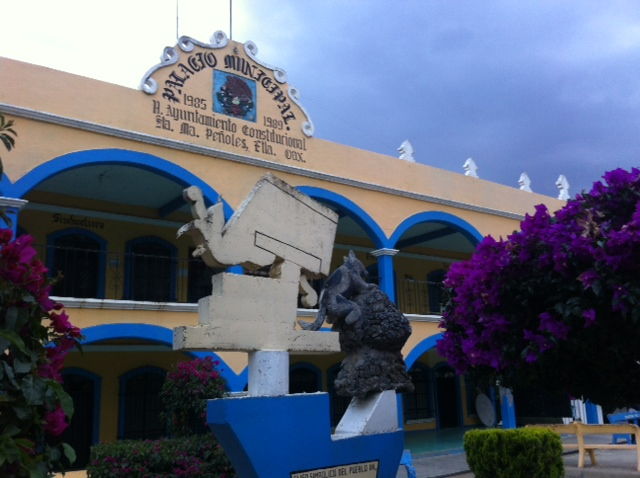 Este edificio alberga el palacio municipal de Santa María Peñoles, al frente se encuentra el escudo.